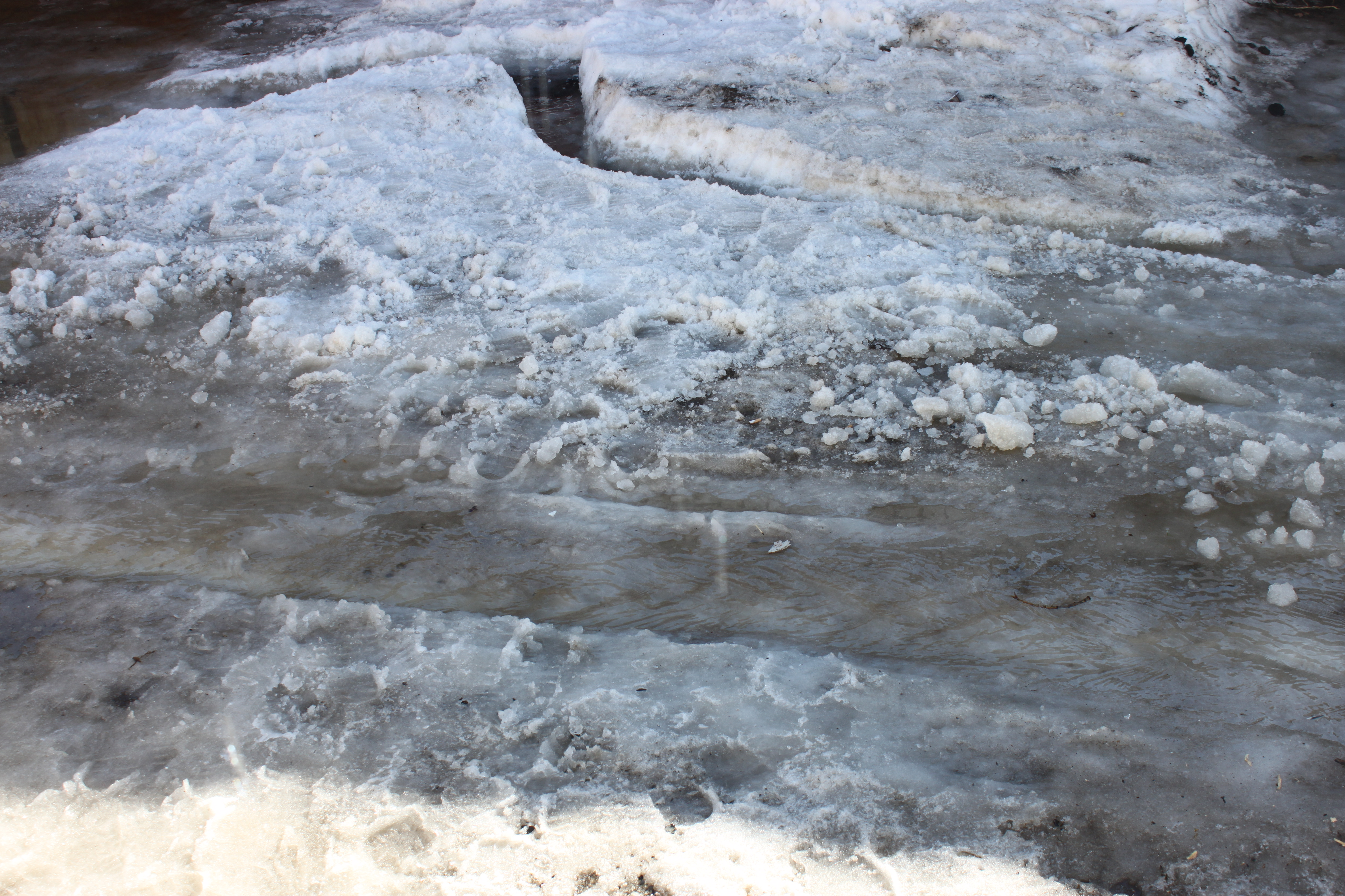 Sugar snow